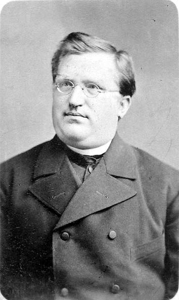 Franz Seraph Schaub (1870-1927), katholischer Priester und Theologieprofessor